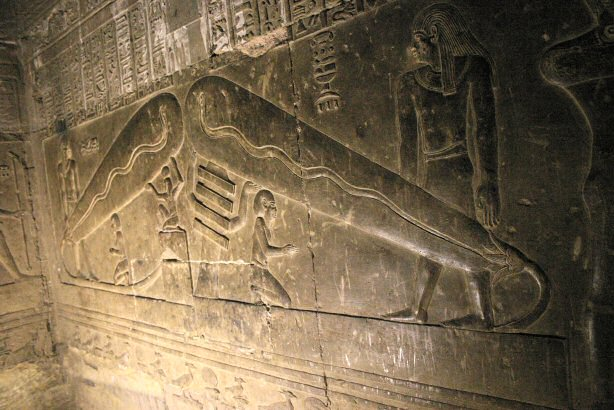 Cripta. Detalle Temple of Denderah. Djed pillar. Image taken by Alex Lbh in April 2005.